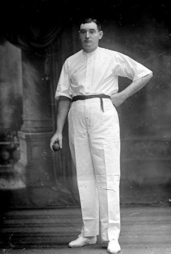 Mondragonés (Juan Bautista Azcárate) in 1928